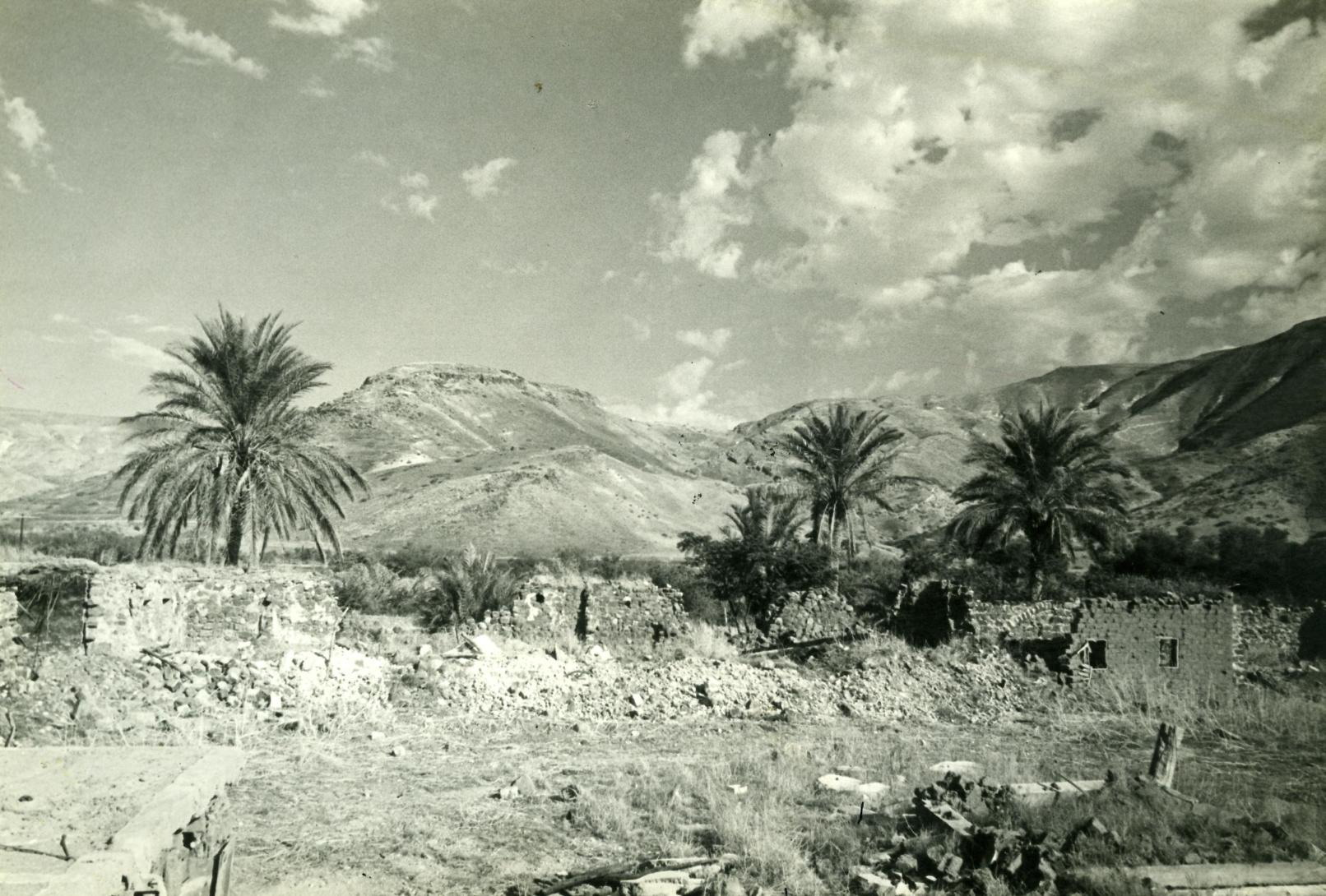 שרידי החווה בנוקייב מדרום לעין גב, מבט מכיוון דרום